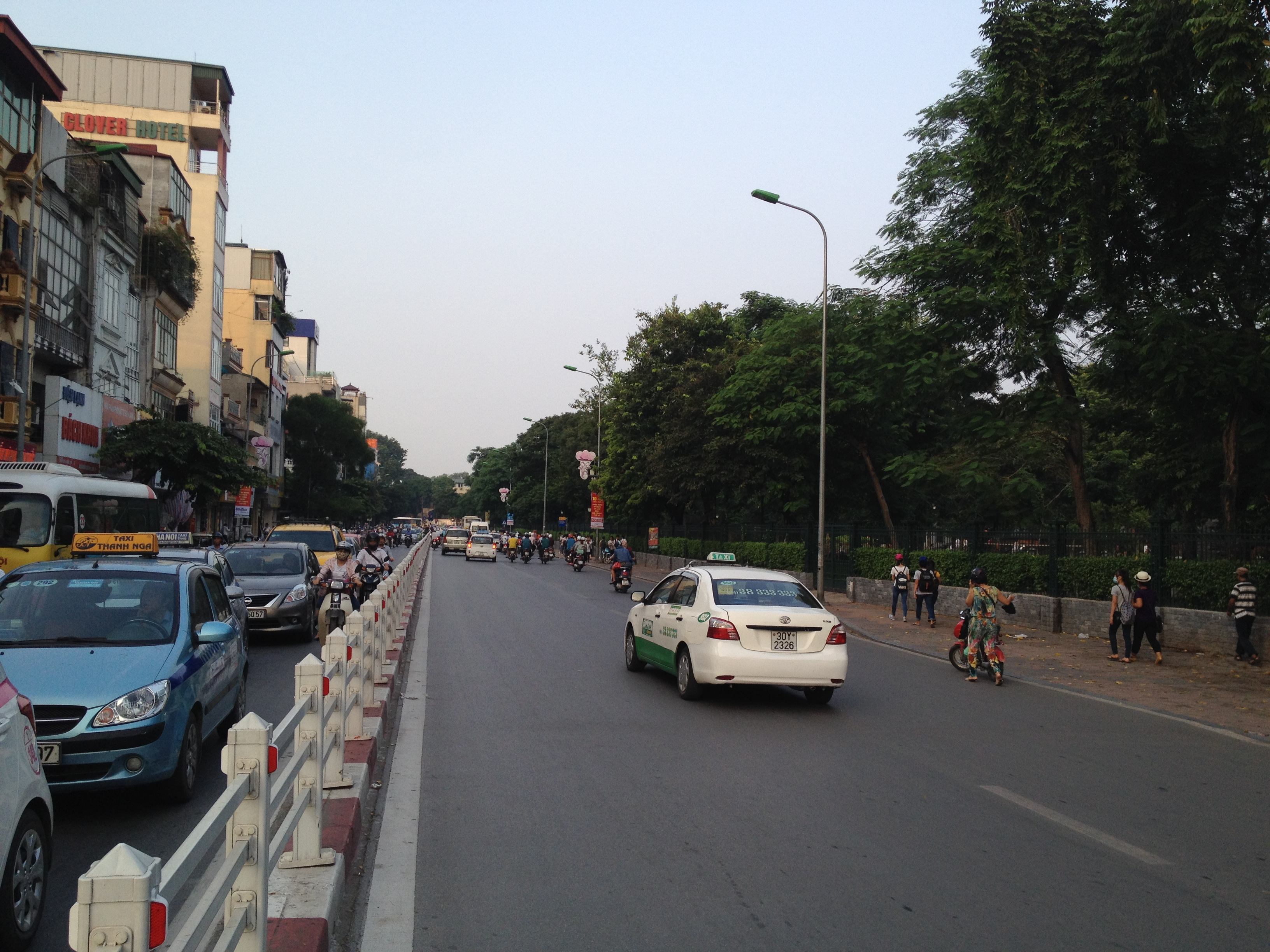 Hà Nội, Việt Nam.